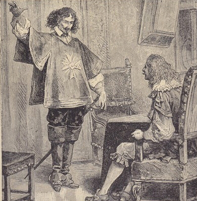 Alexandre Dumas: Le vicomte de Bragelonne, ou Dix ans plus tard (Tři mušketýři ještě po deseti letech aneb Vikomt de Bragelonne)